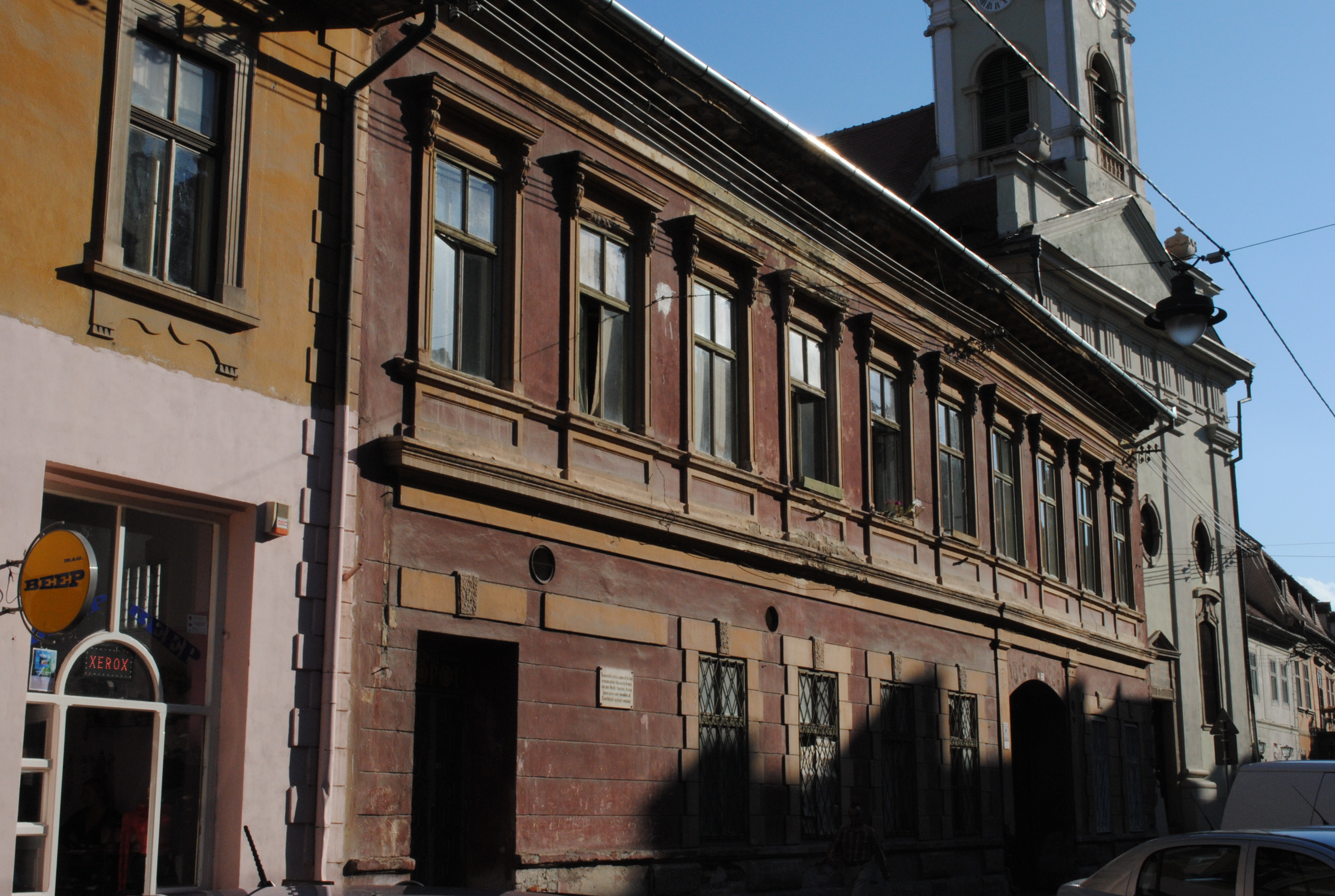 Casă, sec. XIV, sec. XVIII, după 1911